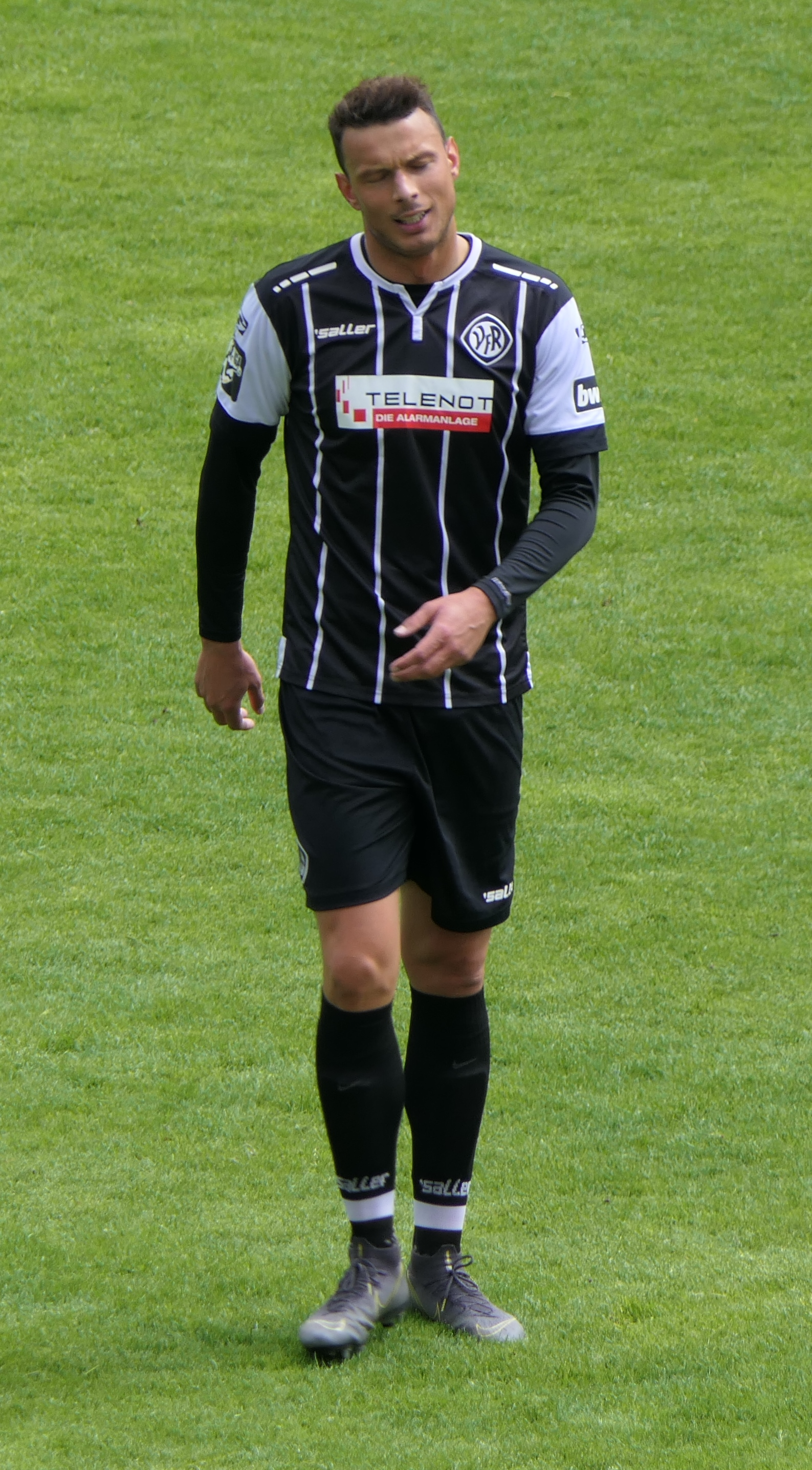 Der Fussballprofi Petar Sliskovic im Trikot des VfR Aalen beim Heimspiel gegen Eintracht Braunschweig am 05.05.2019.